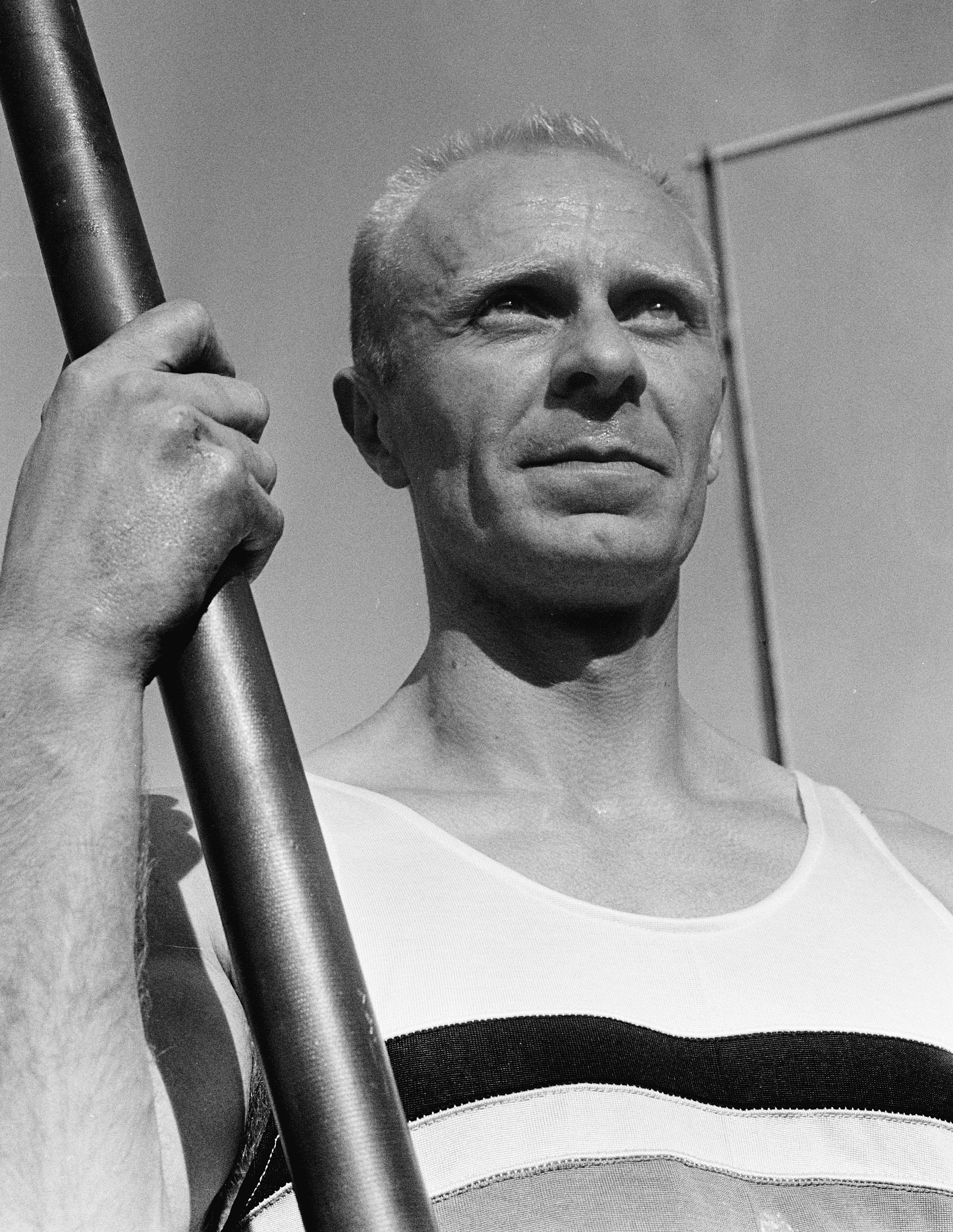 Internationale atletiekwedstrijden Benelux tegen Engeland Gent, de Belg Coppejans (kop)